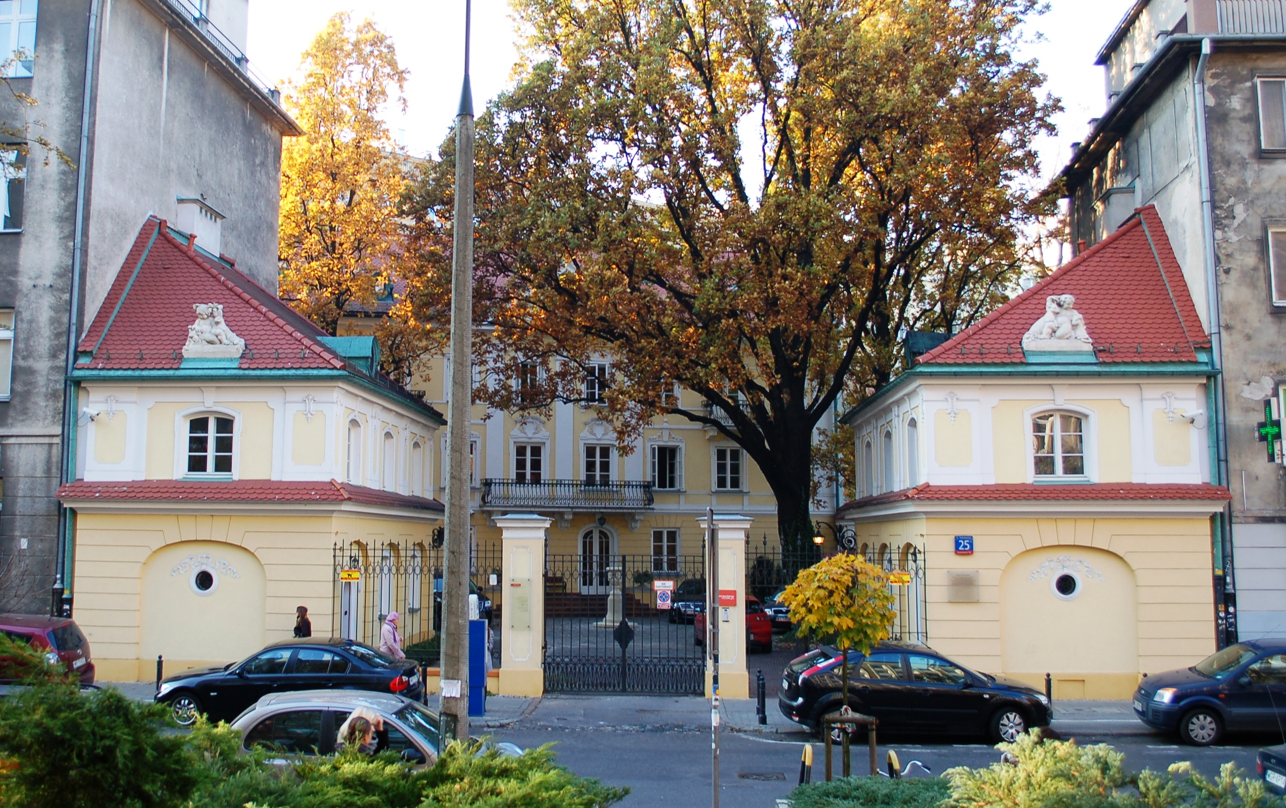 Warsaw, Mokotowska 25, Instytut Adama Mickiewicza